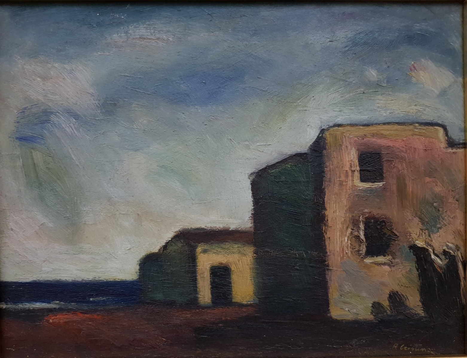 Paesaggio Marino, 1963, Rodolfo Cristina